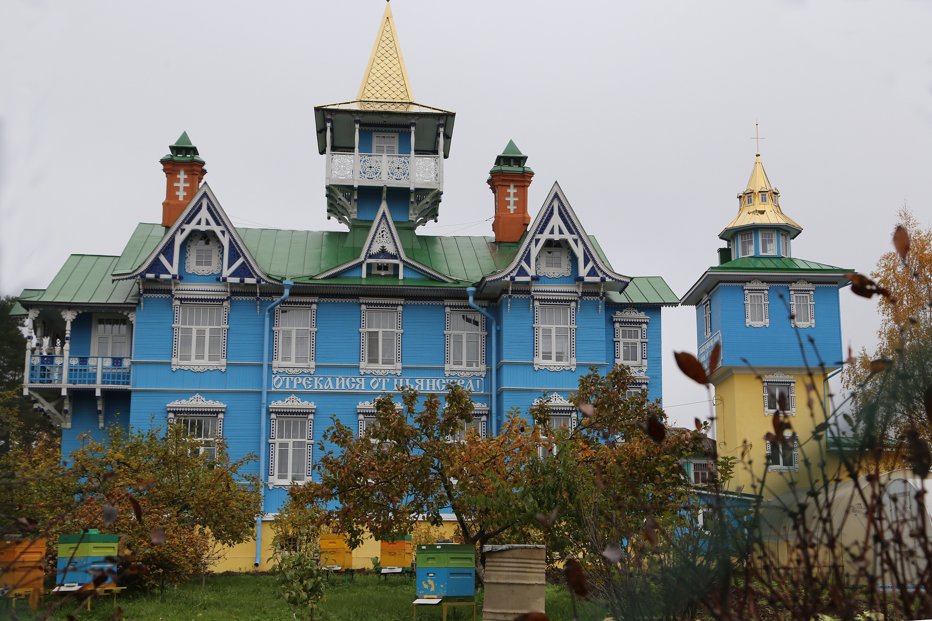 Молитвенный дом братца Иоанна Чурикова: Павловский проспект, 1, Вырица, Гатчинский район, Ленинградская область